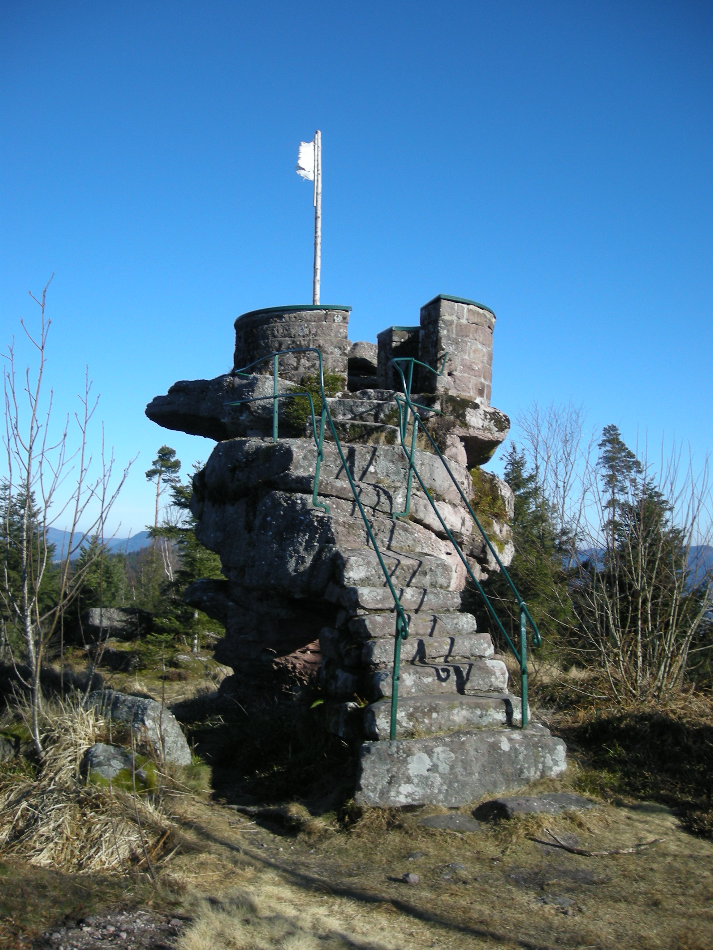 Ancien observatoire-signal à la Roche du Sapin Sec (massif de l'Ormont, Vosges)